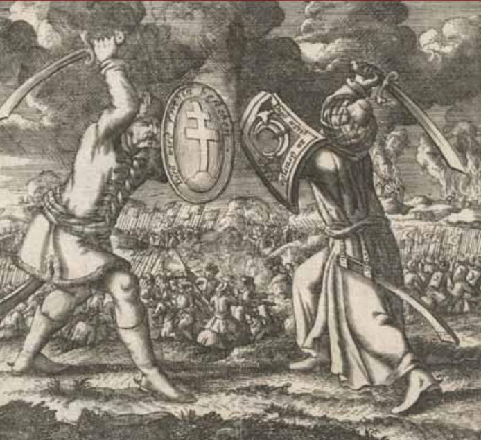 Allegorikus ábrázolása a keresztény-török összecsapásnak 1684